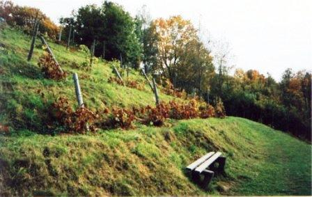 Viinamägi Sabiles